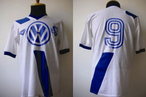 1989 jersey